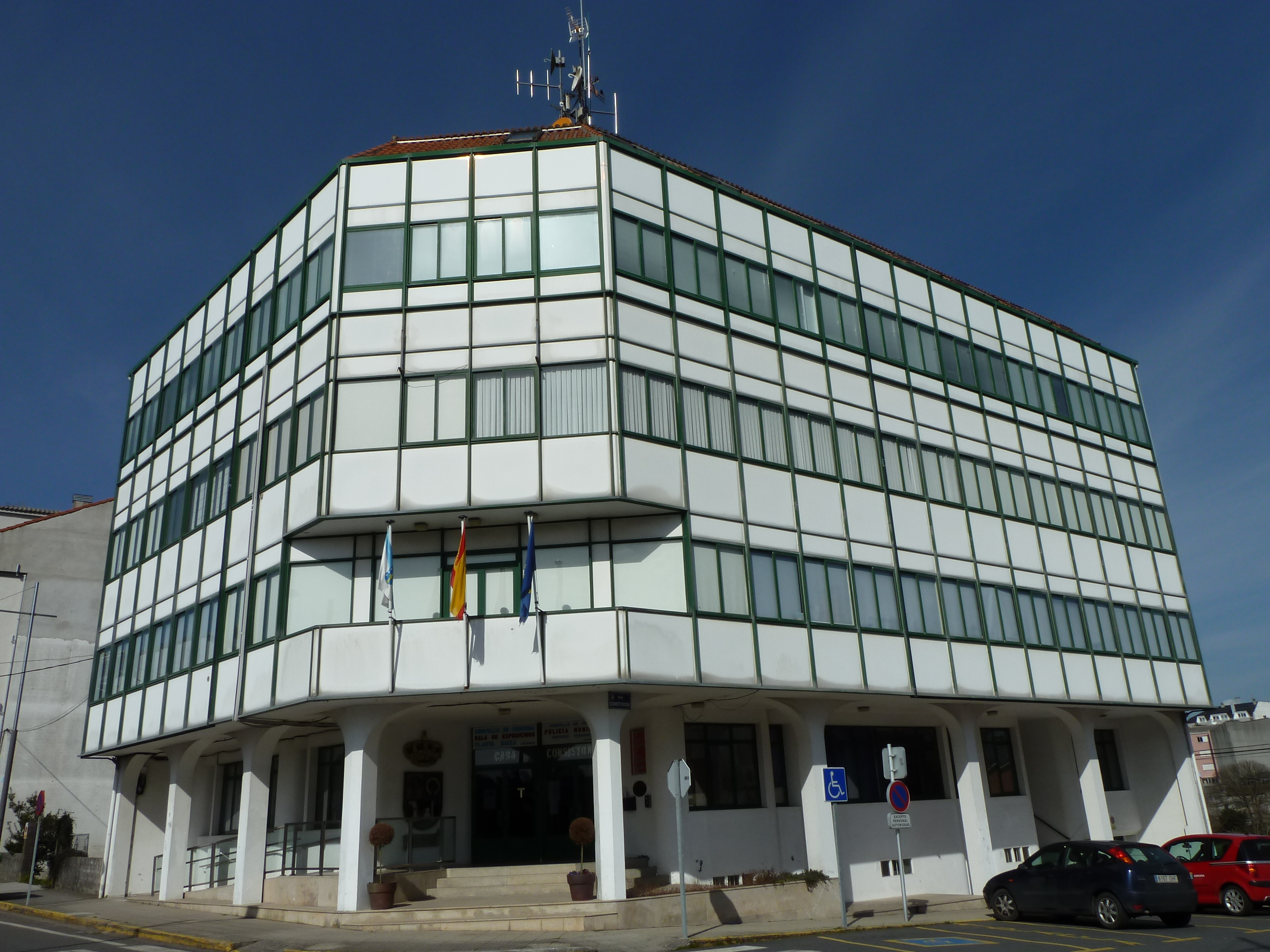 Casa do concello de Cerceda.